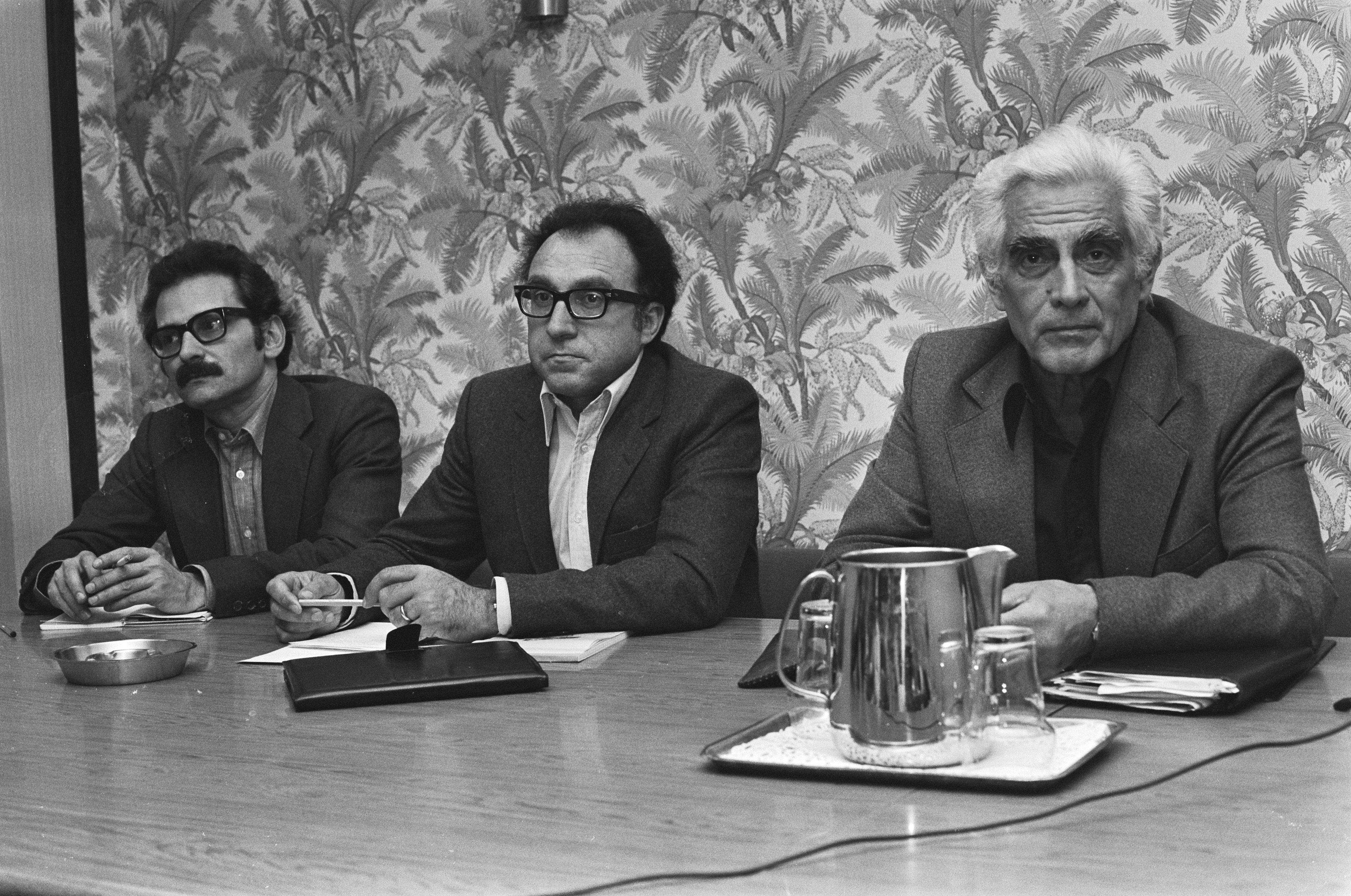 Collectie / Archief : Fotocollectie Anefo Reportage / Serie : [ onbekend ] Beschrijving : Persconferentie van de leider van de Portugese Communistische Part ij, Alvaro Cunhal in Krasnapolsky in Amsterdam; vlnr Albano Nunes , Domingos Abrantes en Cunhal Datum : 17 april 1980 Locatie : Amsterdam, Noord-Holland Trefwoorden : persconferenties, politici Persoonsnaam : Albano Nunes, Cunhal, Alvaro, Domingos Abrantes Fotograaf : Pereira, Fernando / Anefo Auteursrechthebbende : Nationaal Archief Materiaalsoort : Negatief (zwart/wit) Nummer archiefinventaris : bekijk toegang 2.24.01.05 Bestanddeelnummer : 930-7751